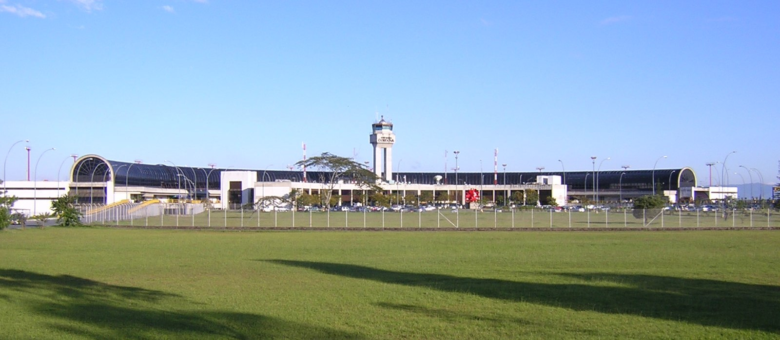 Exterior del Aeropuerto Internacional José María Córdova